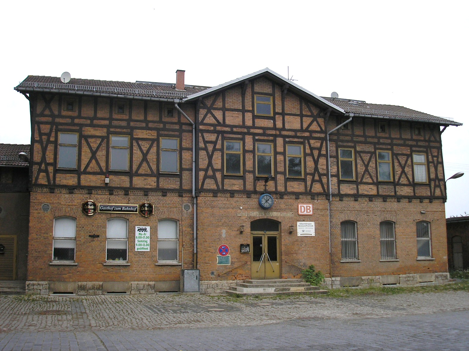 Der Bahnhof von Buttstädt (Thüringen).